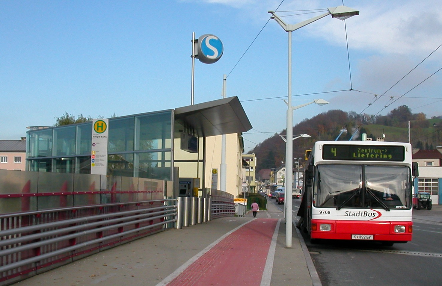 Obus der Linie 4 in Station Salzburg Gnigl S-Bahn